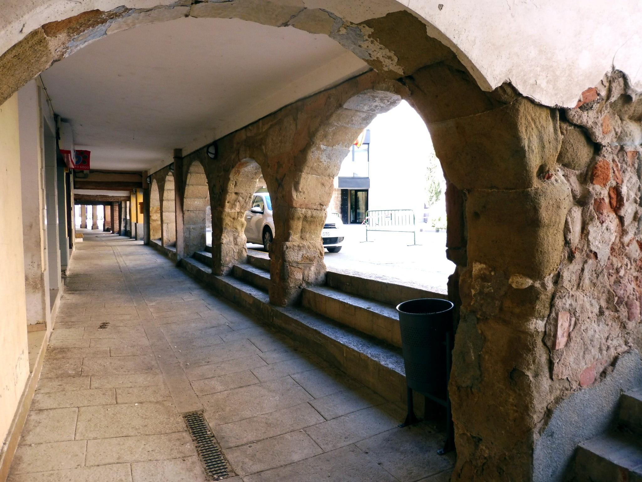 Plaça de l'Església de Menàrguens: porxos